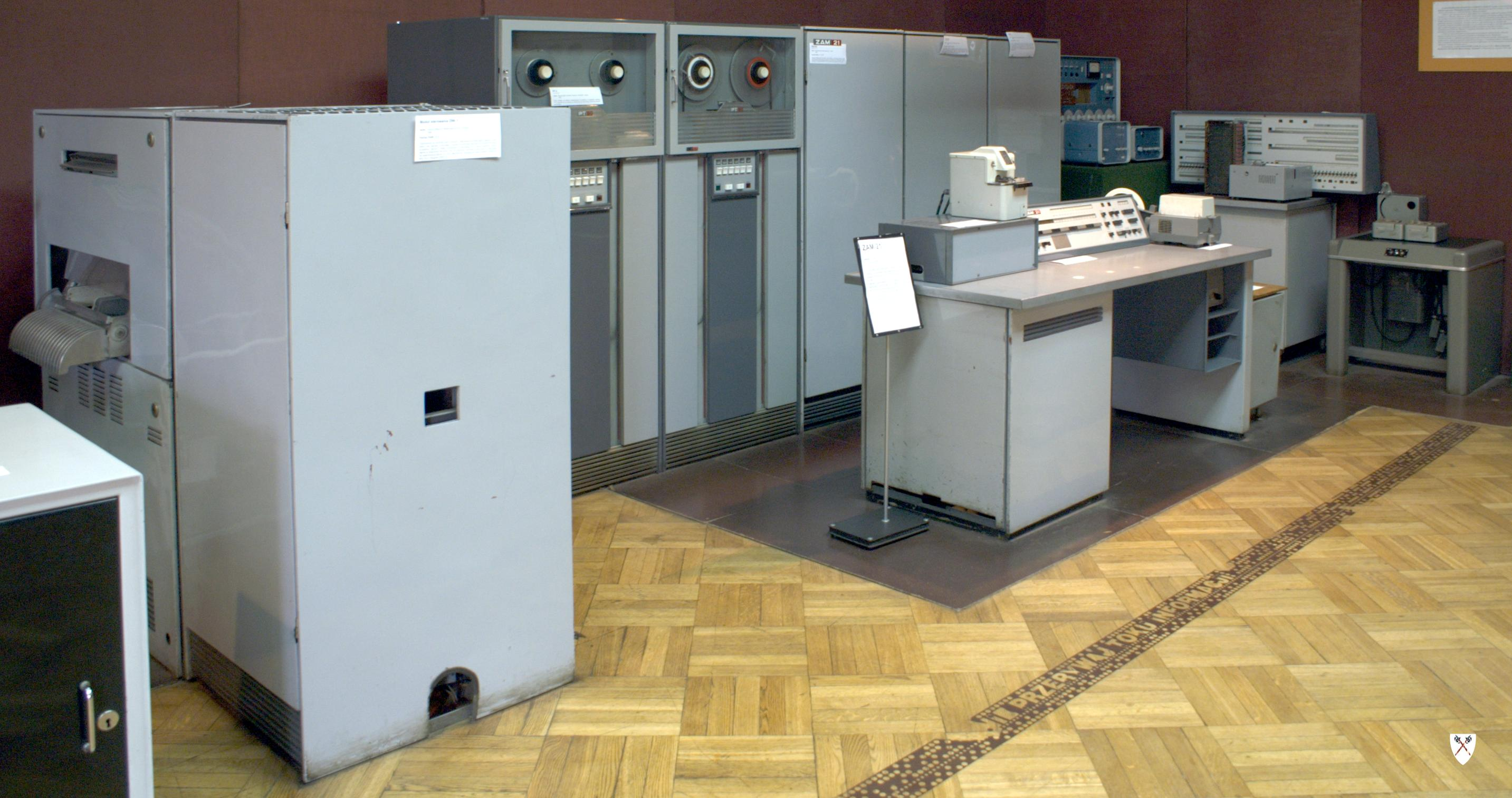 ZAM-21